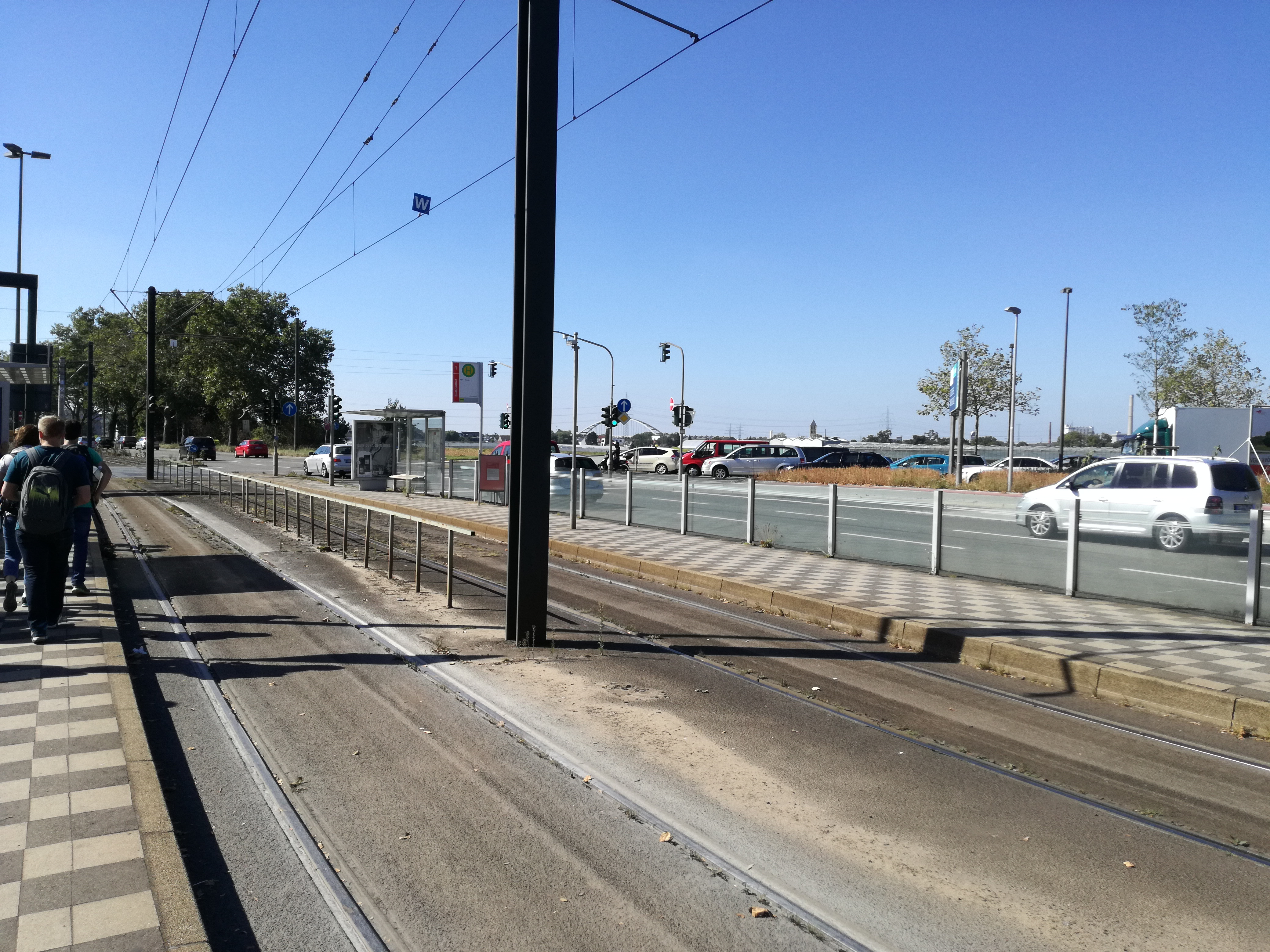 Die Station "Südfriedhof"